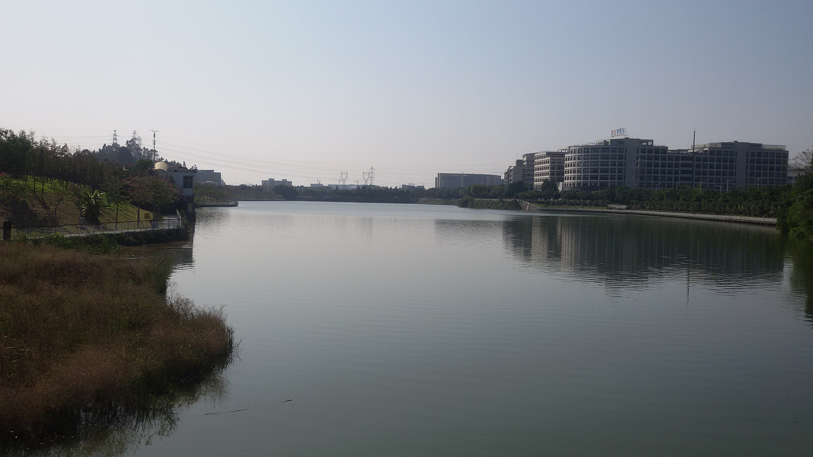 粵語: 喺大觀濕地向南望去智慧東湖